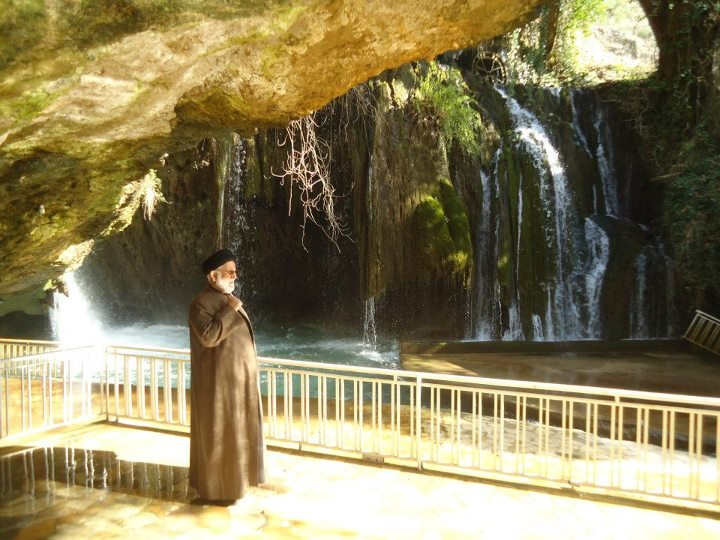 السيد هاني فحص